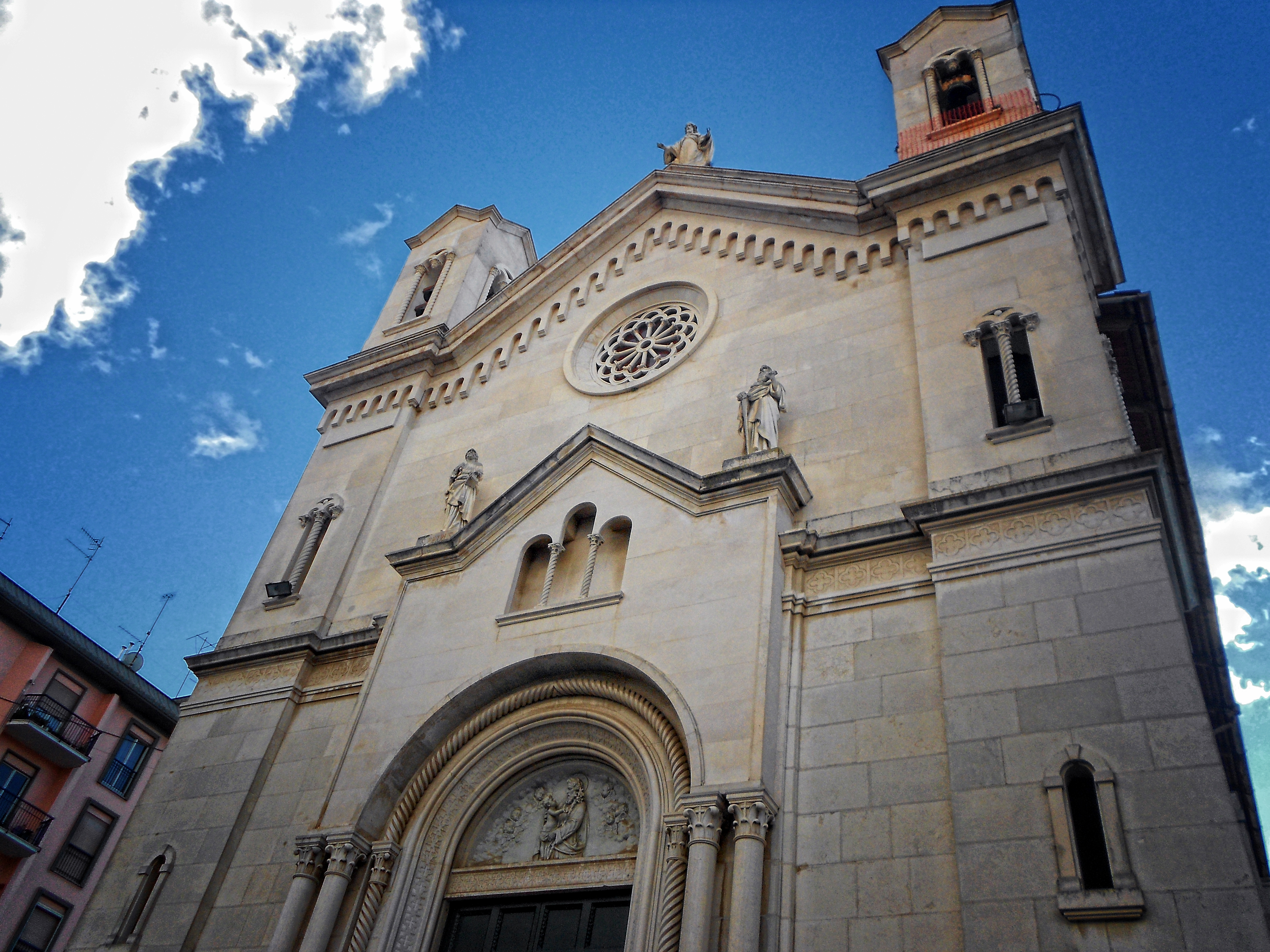 Chiesa di San Giuseppe, Sant'Agnello